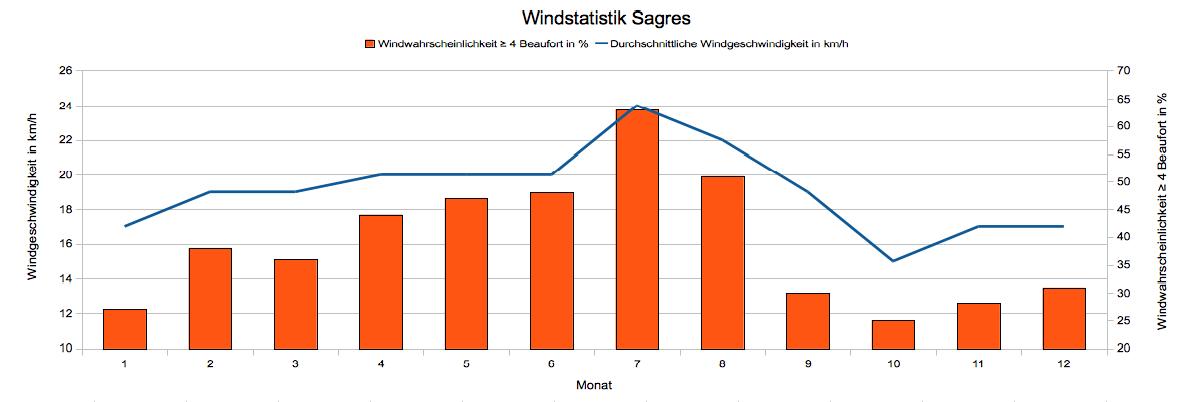 Windstatistik von Sagres in Portugal